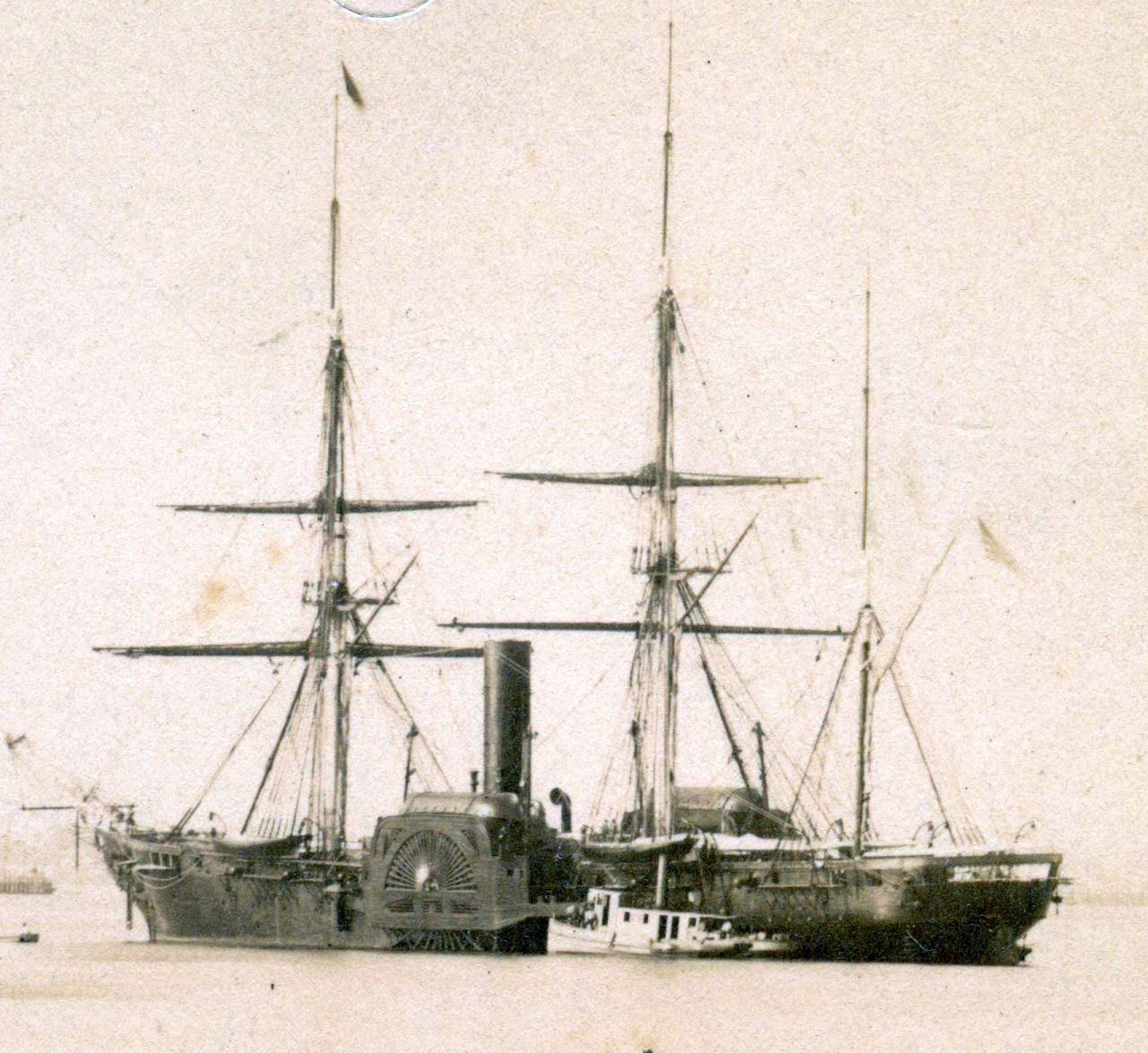 USS Susquehanna (1850)